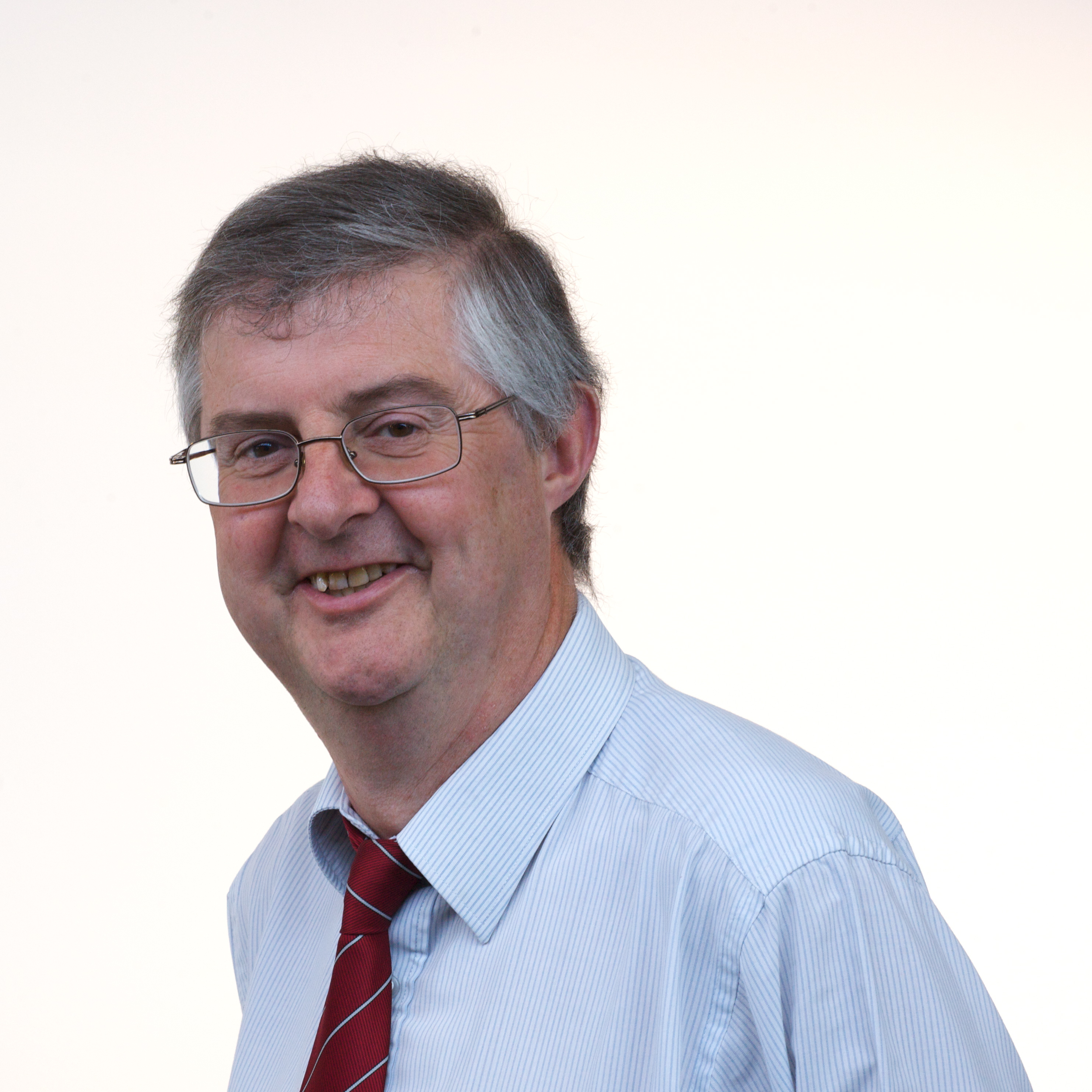 Mark Drakeford, Assembly Member for Cardiff West / Aelod Cynulliad dros Orllewin Caerdydd